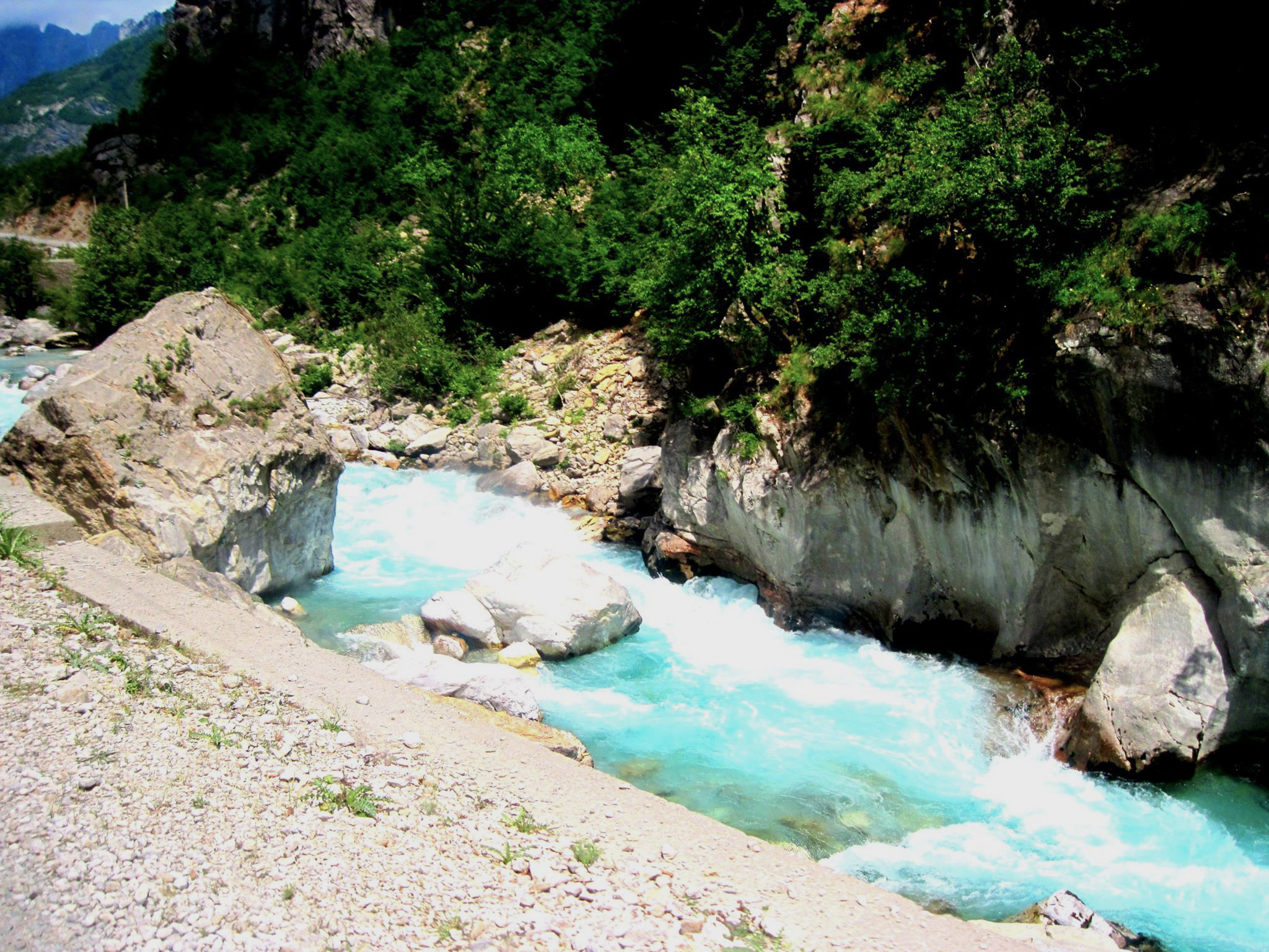 Lumi i valbones.